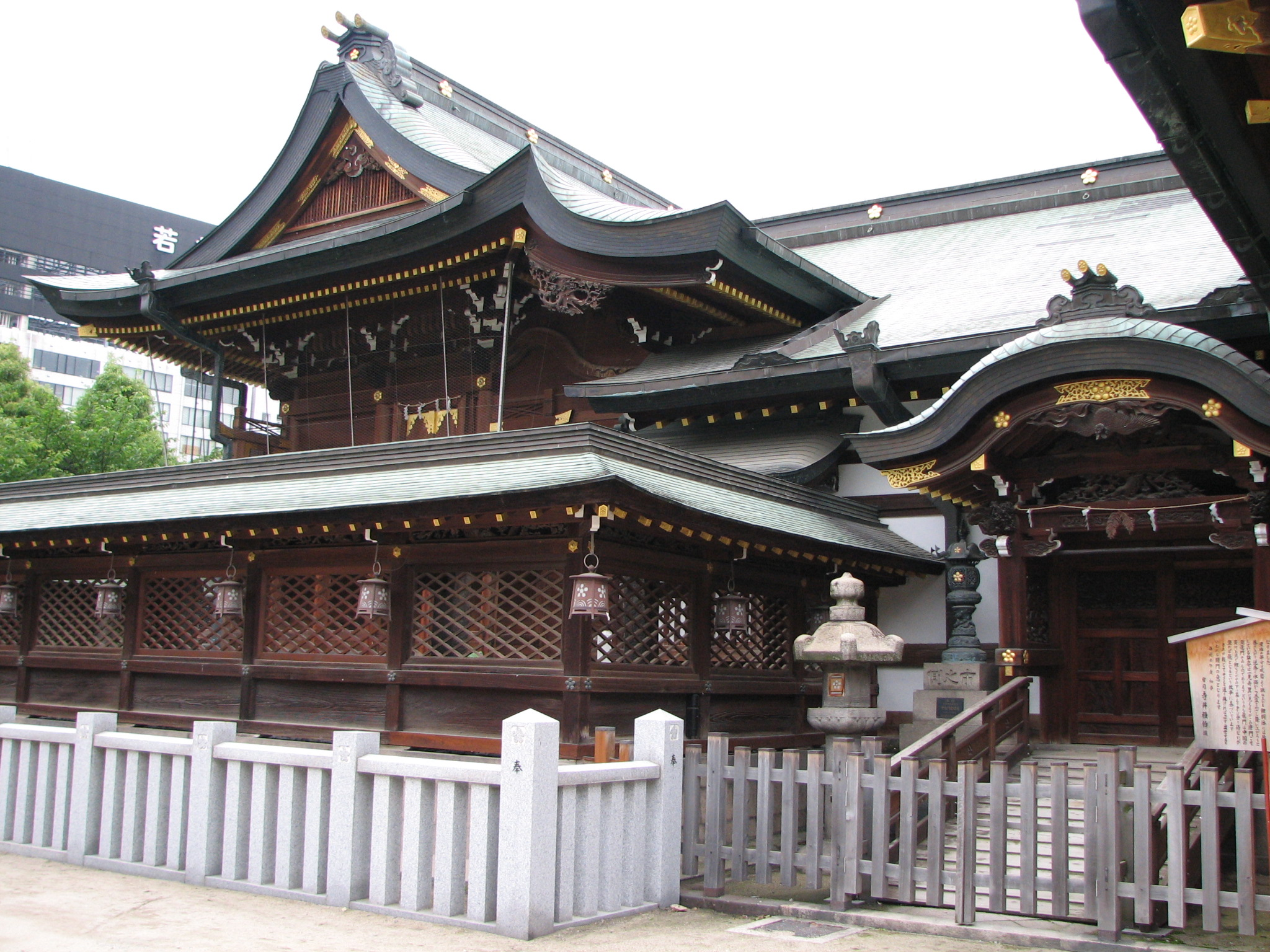 The honden of Ōsaka Temman-Gu, Kita, Ōsaka, Japan 大阪天満宮（大阪市北区）本殿